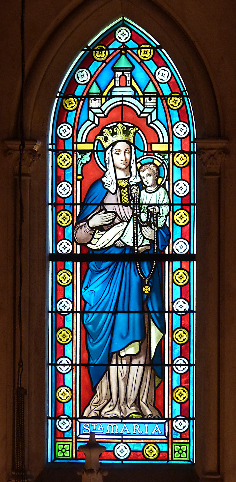 Vitrail Vierge à l'enfant Chapelle de La Royante Aubagne France